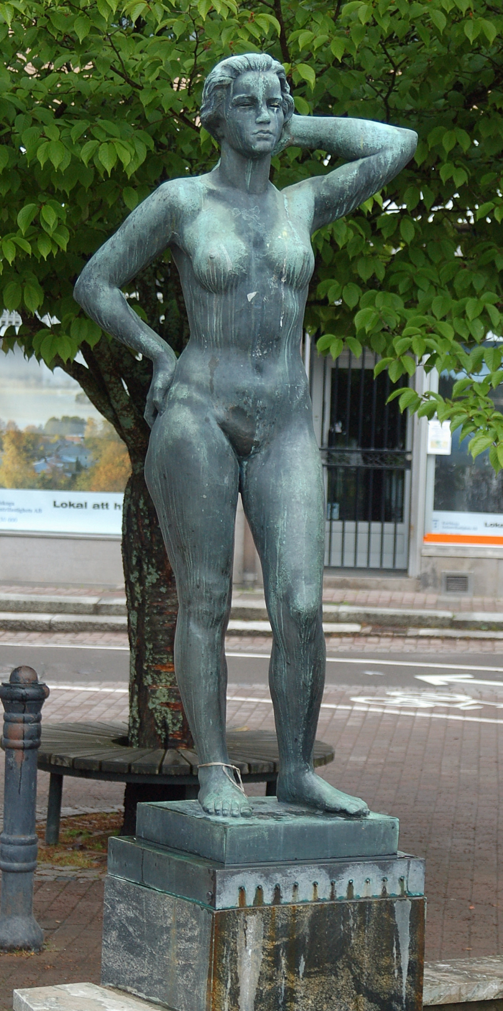 Statyn Morgon av kontnären Oscar Antonsson från 1940 placerad på torget i Karlskoga